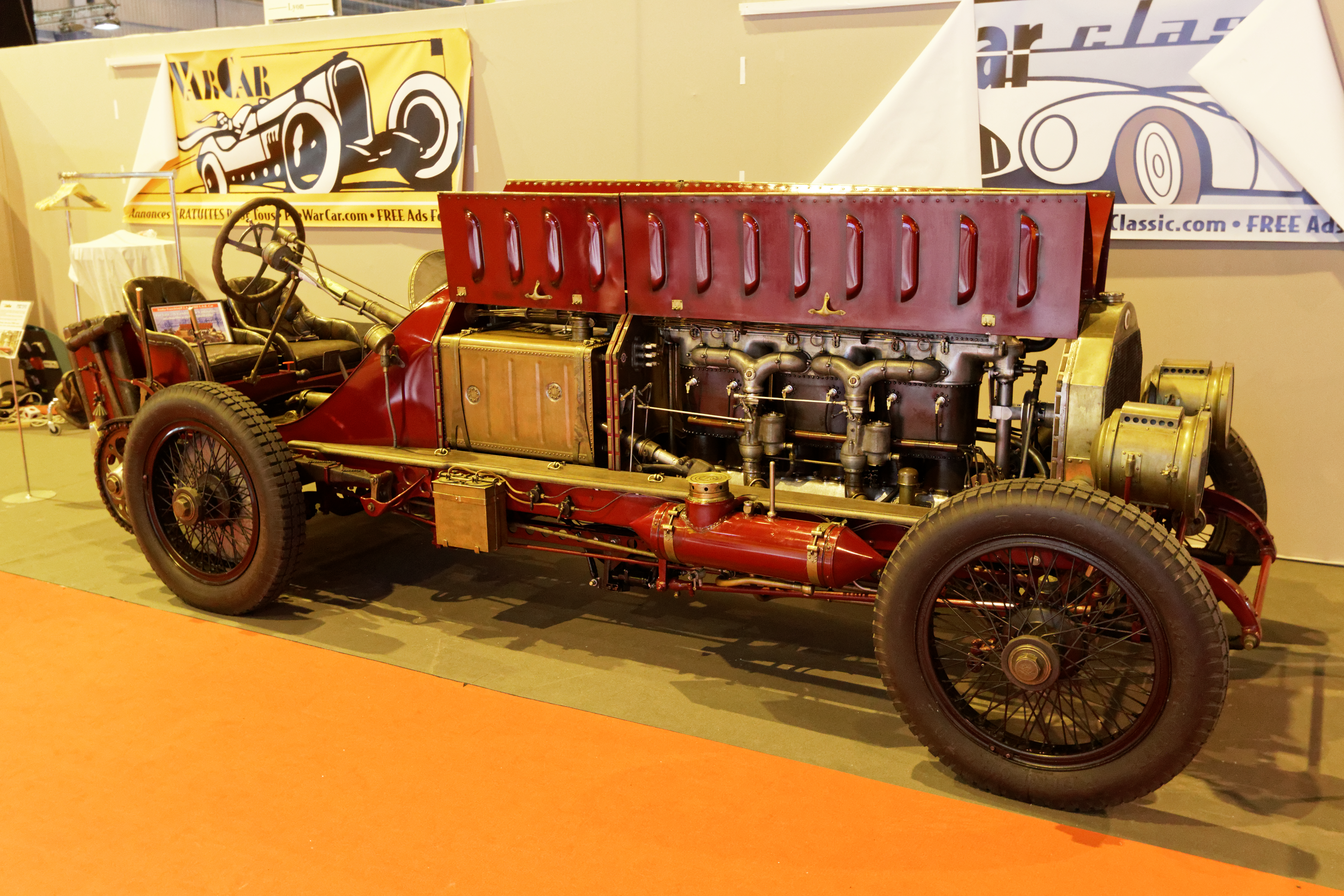 Une Fiat Isotta-Fraschini de 1905 exposée lors du salon Rétromobile 2016.